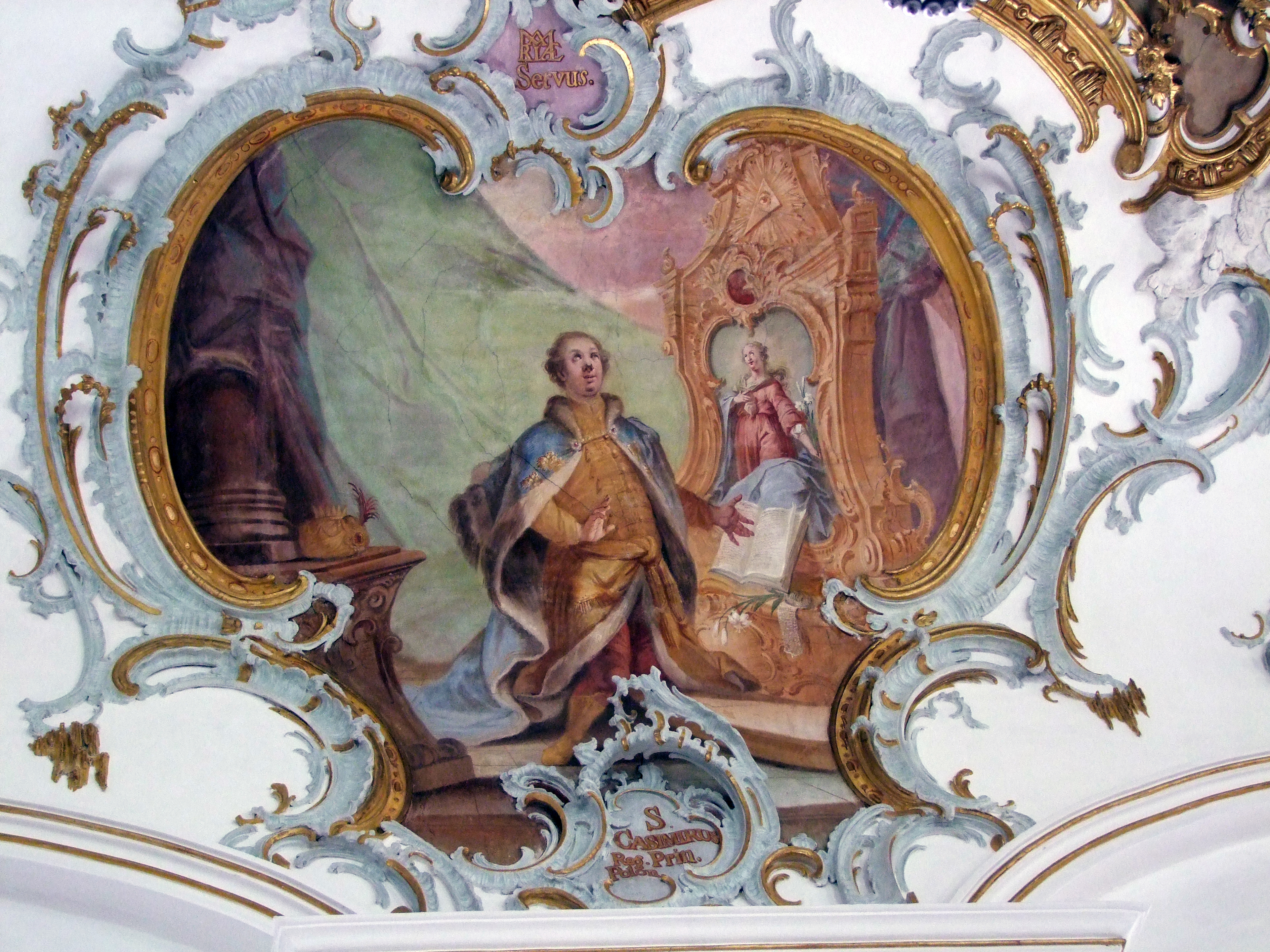 Wallfahrtskirche "Unserer lieben Frau vom Berge Karmel" im oberschwäbischen Mussenhausen, Gemeindeteil Markt Rettenbachs bei Memmingen. Casimir im Langhaus. Maler war Johann Baptist Enderle, welcher die Kirche von 1766 ausmalte.